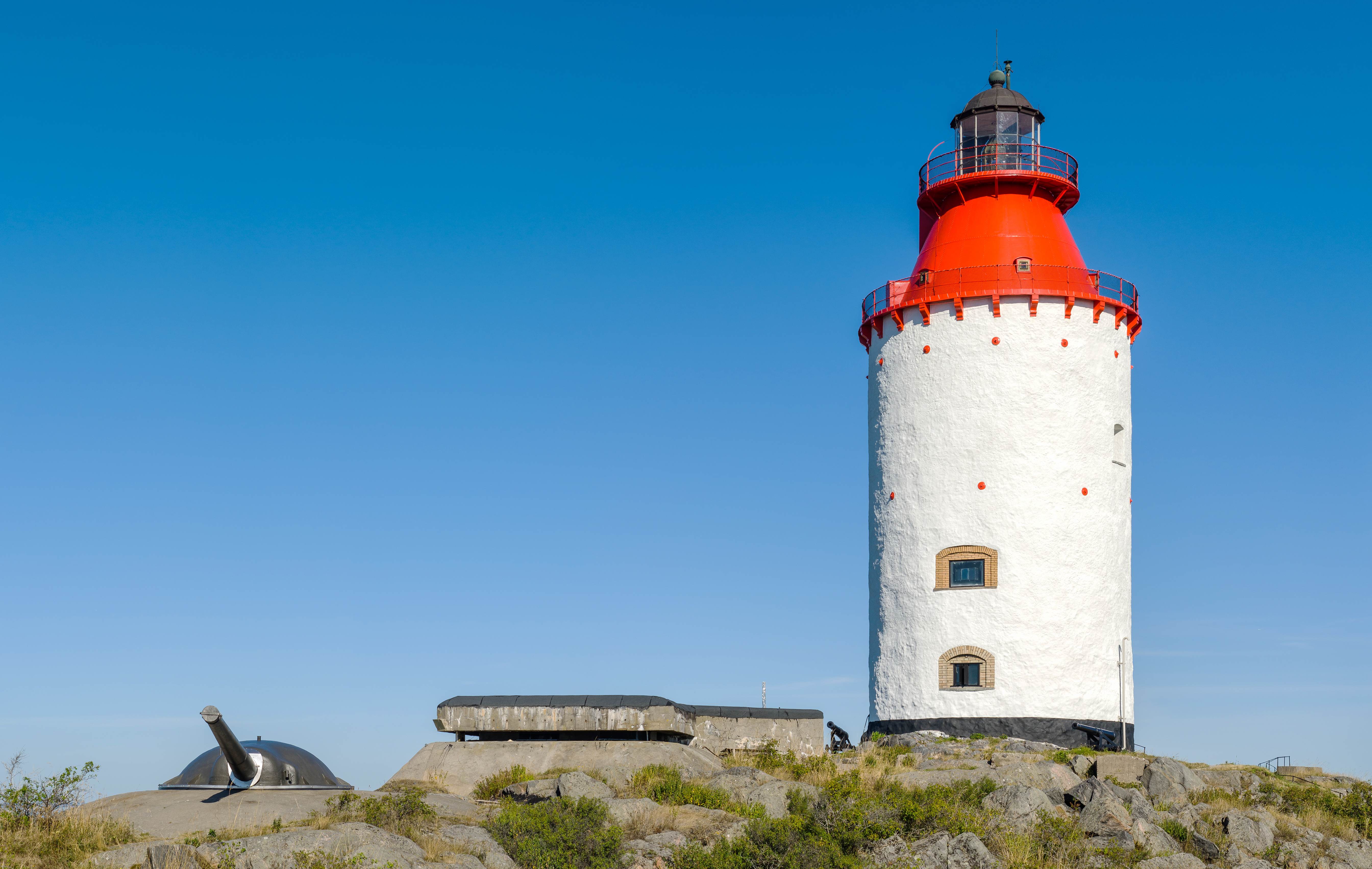 Landsort Lighthouse (view from east), Öja island (Landsort), Stockholm archipelago's most southern point. During the Cold War and World War II was Landsort a military base for the Swedish coastal artillery.